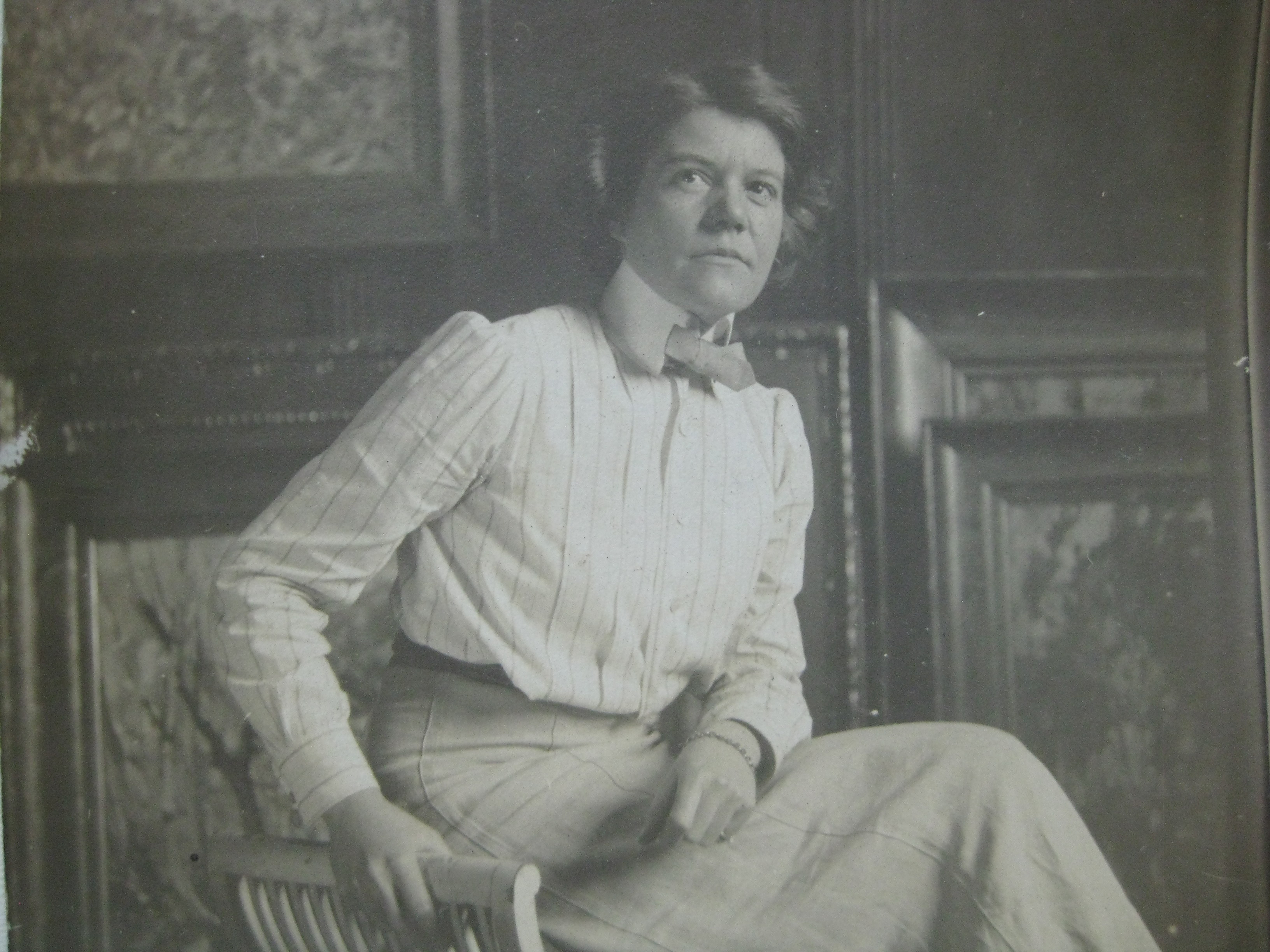 mit ihren Bildern in Fürstenfeldbruck (private Aufnahme)